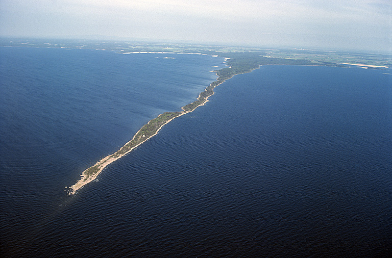 Israndbildning, bildad parallellt med iskanten och vinkelrätt mot rullstensåsarna. Motiv: Hindens rev Nyckelord: Naturreservat Kategori: Kust- och skärgårdsmiljö Israndbildning, bildad parallellt med iskanten och vinkelrätt mot rullstensåsarna.